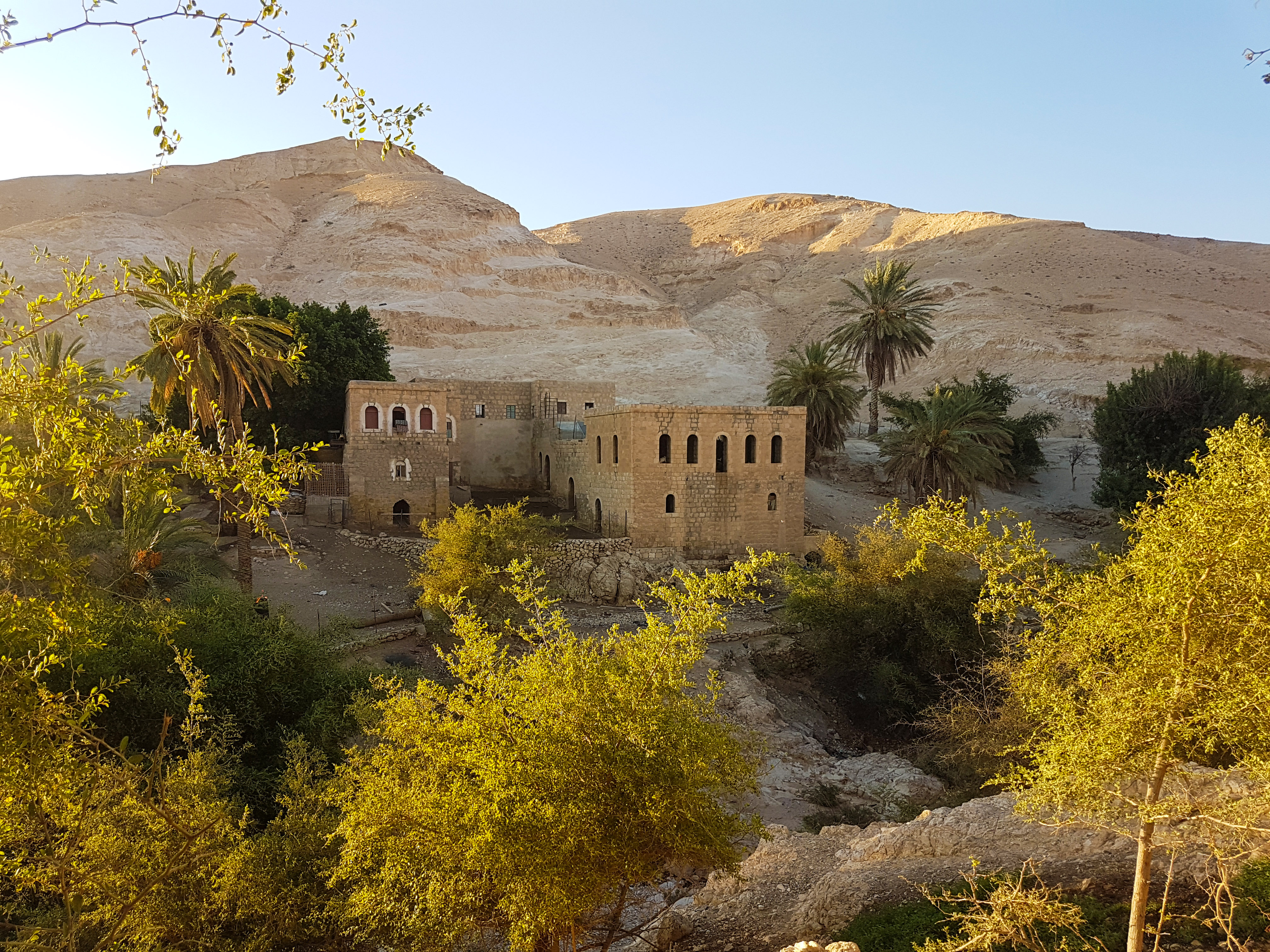 מבנים עתיקים סמוך לעין קלט